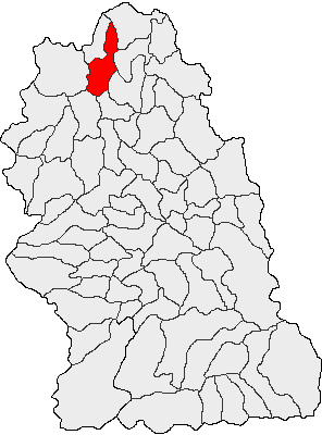 Categorie:Hărţi ale judeţului Hunedoara